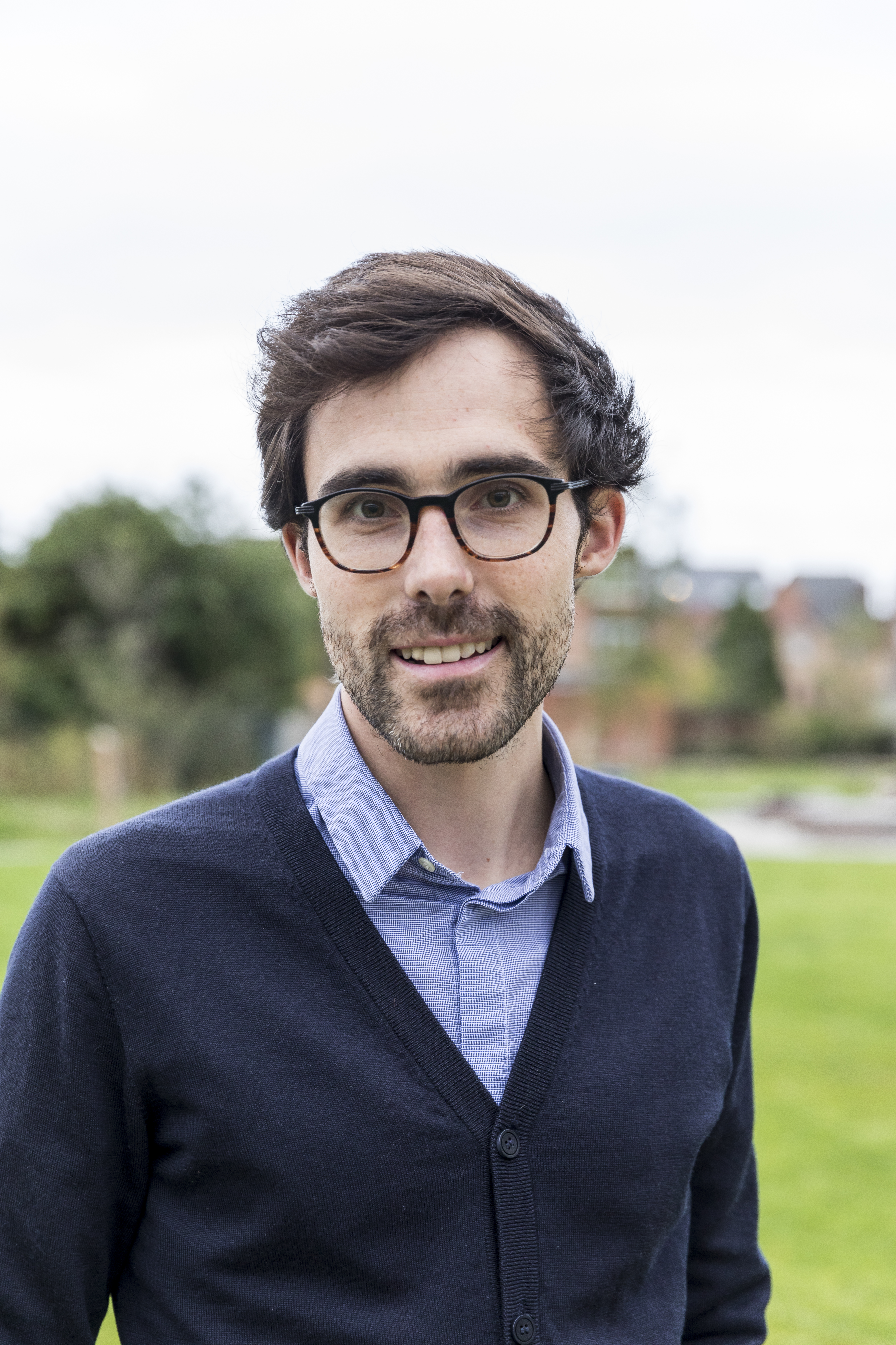 Kristof Calvo, Kamerlid voor Groen in oktober 2017.